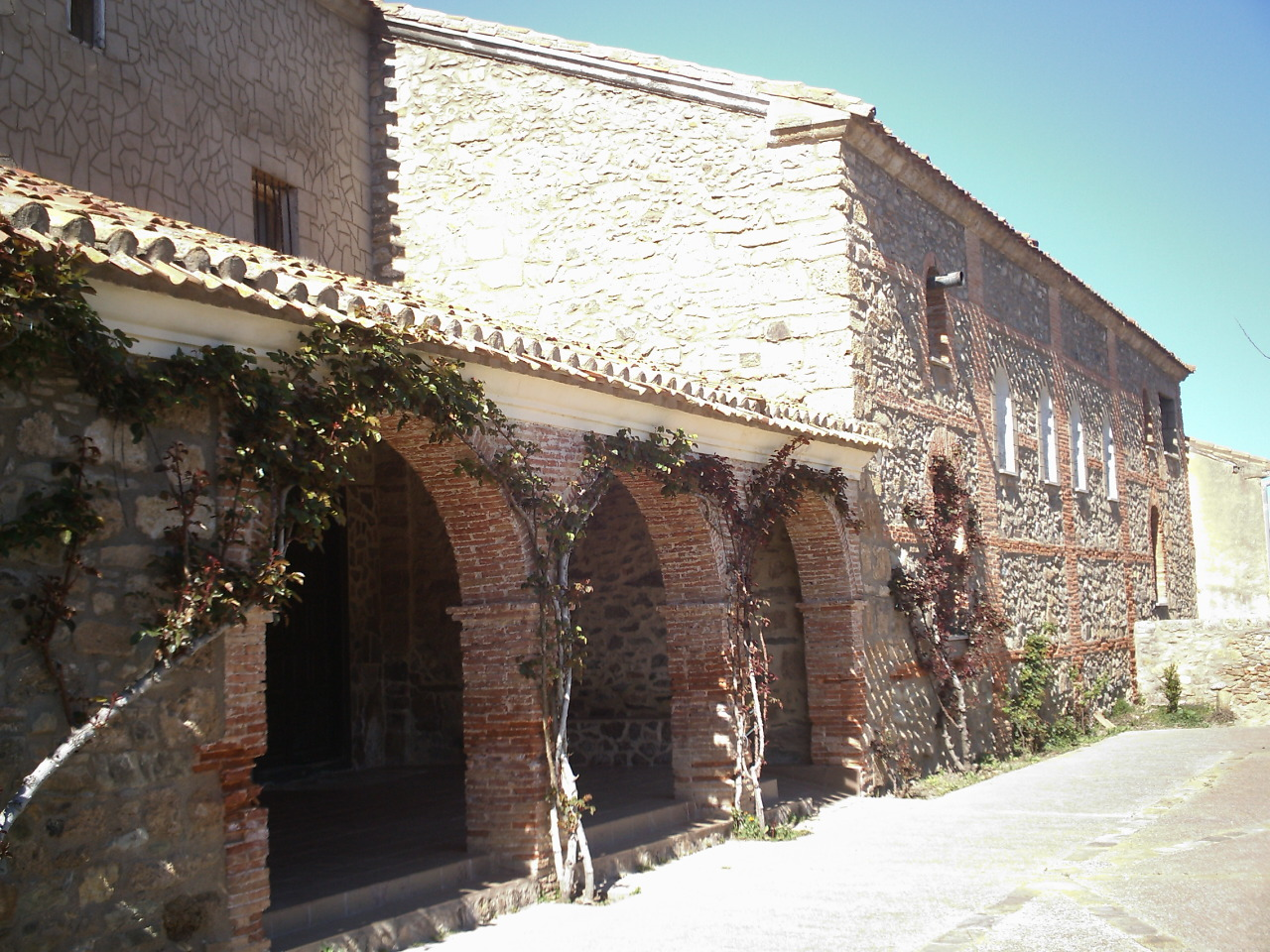 Devanos - Soria (España) Iglesia de la Virgen del Patrocinio